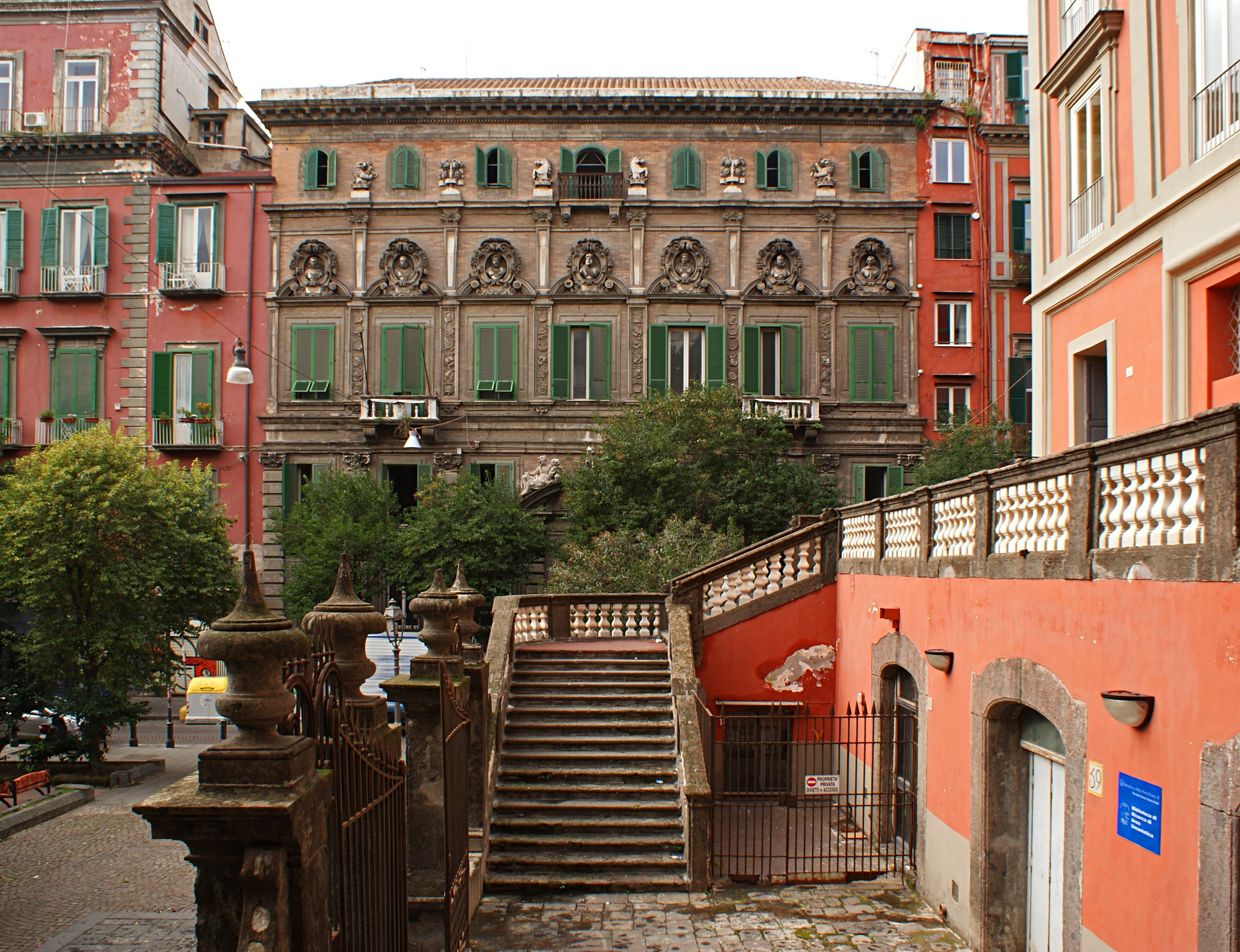 Palazzo Firrao, visto dalla Chiesa di Sant'Antonio delle Monache a Port'Alba, Napoli, Italia